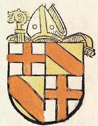 Wappen des Konstanzer Bischofs Otto III. von Hachberg. Wappen isoliert und Hintergrund bereinigt.